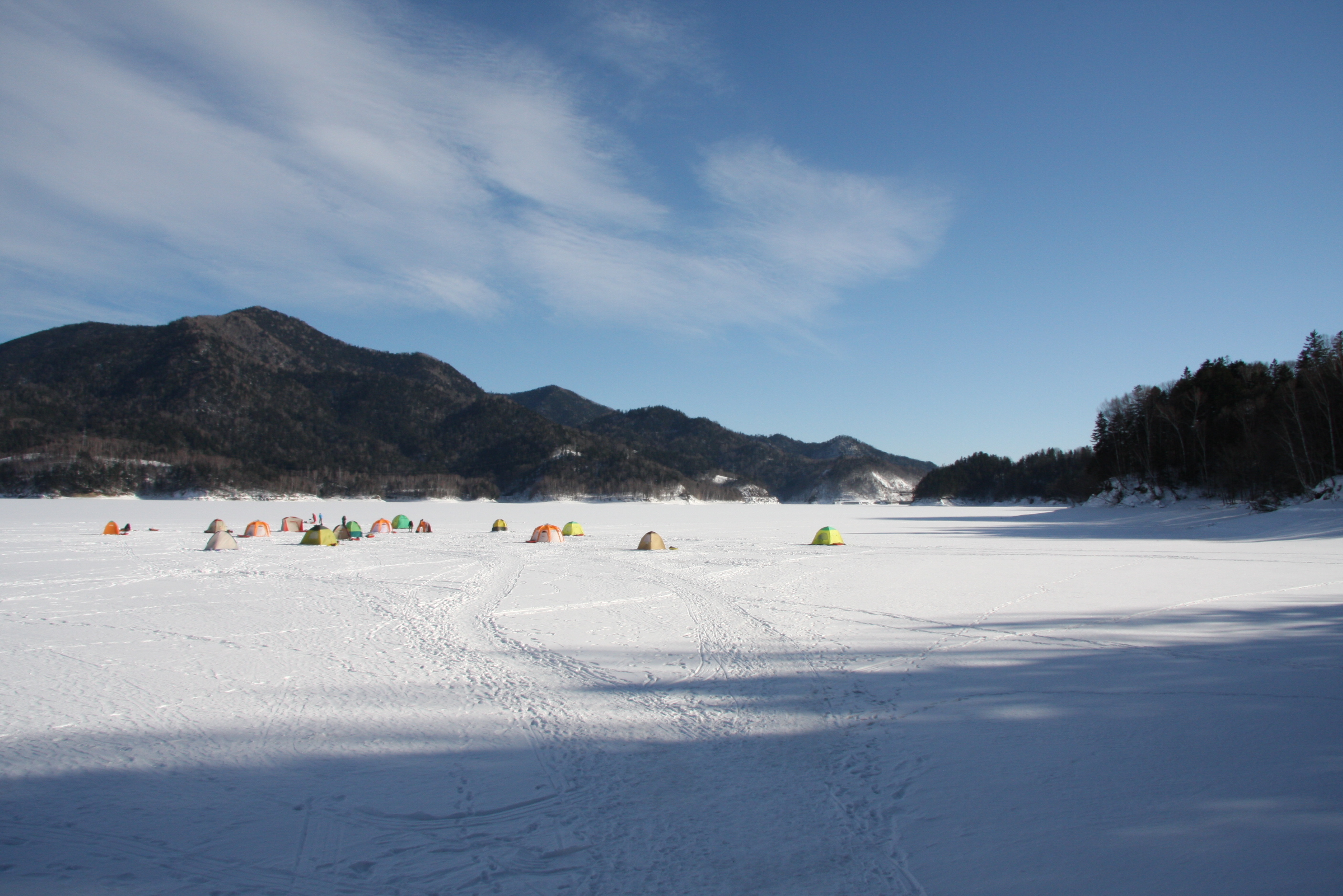 ワカサギ釣りで賑わう冬の糠平湖